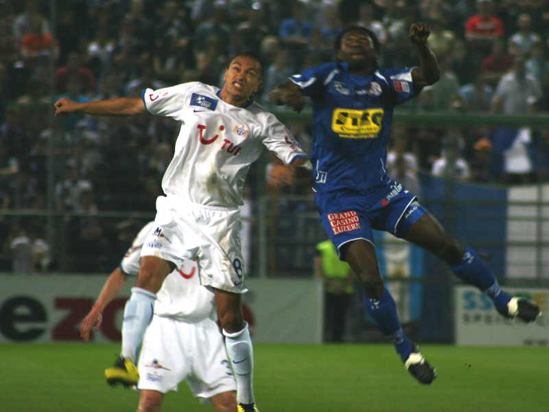 Gökhan Inler, FCZ, Hardturm Stadion (Schweiz), Pokal Halbfinale, FC Zürich - FC Luzern 2:3